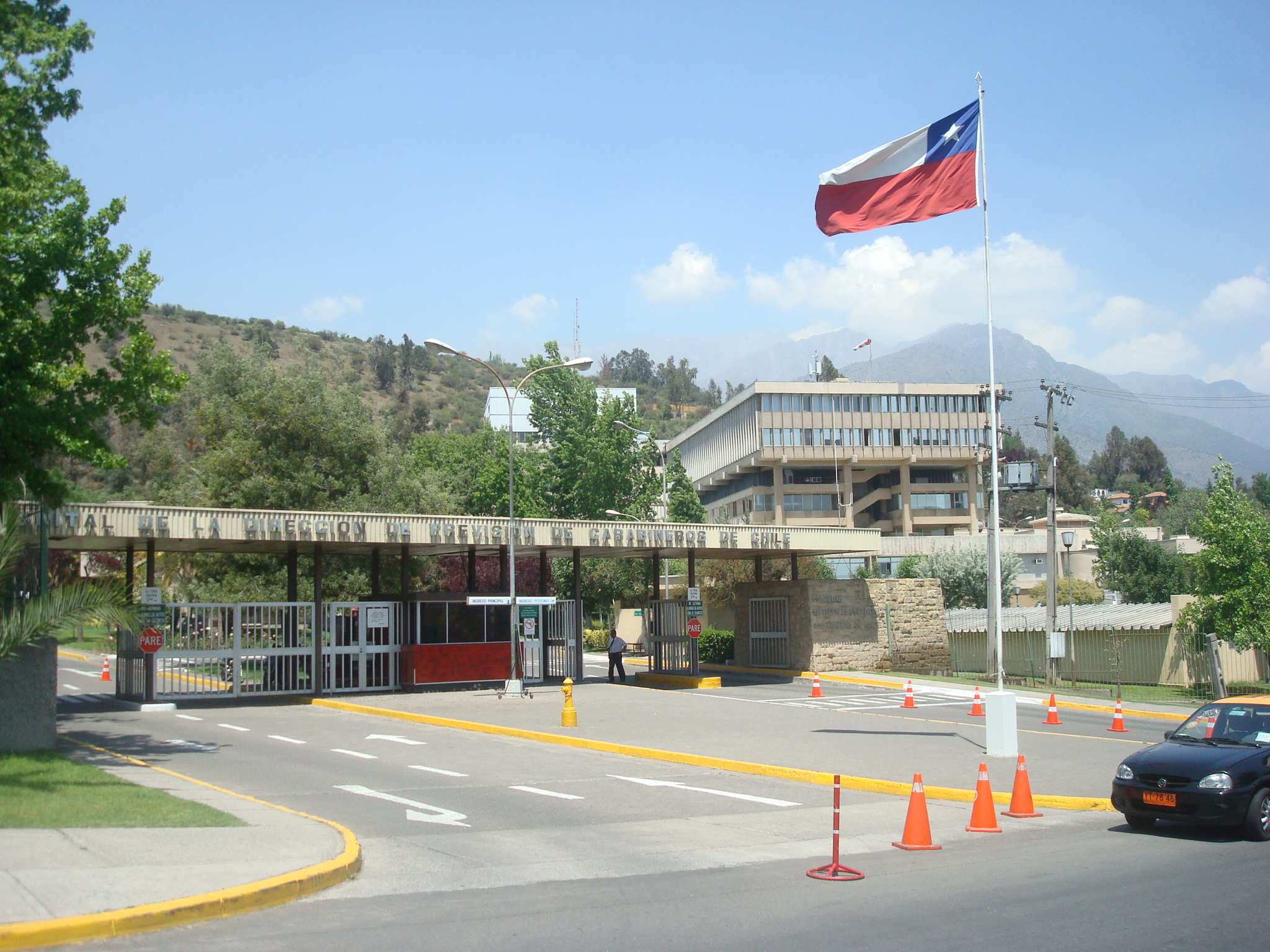 Hospital Dipreca, Las Condes, Santiago de Chile